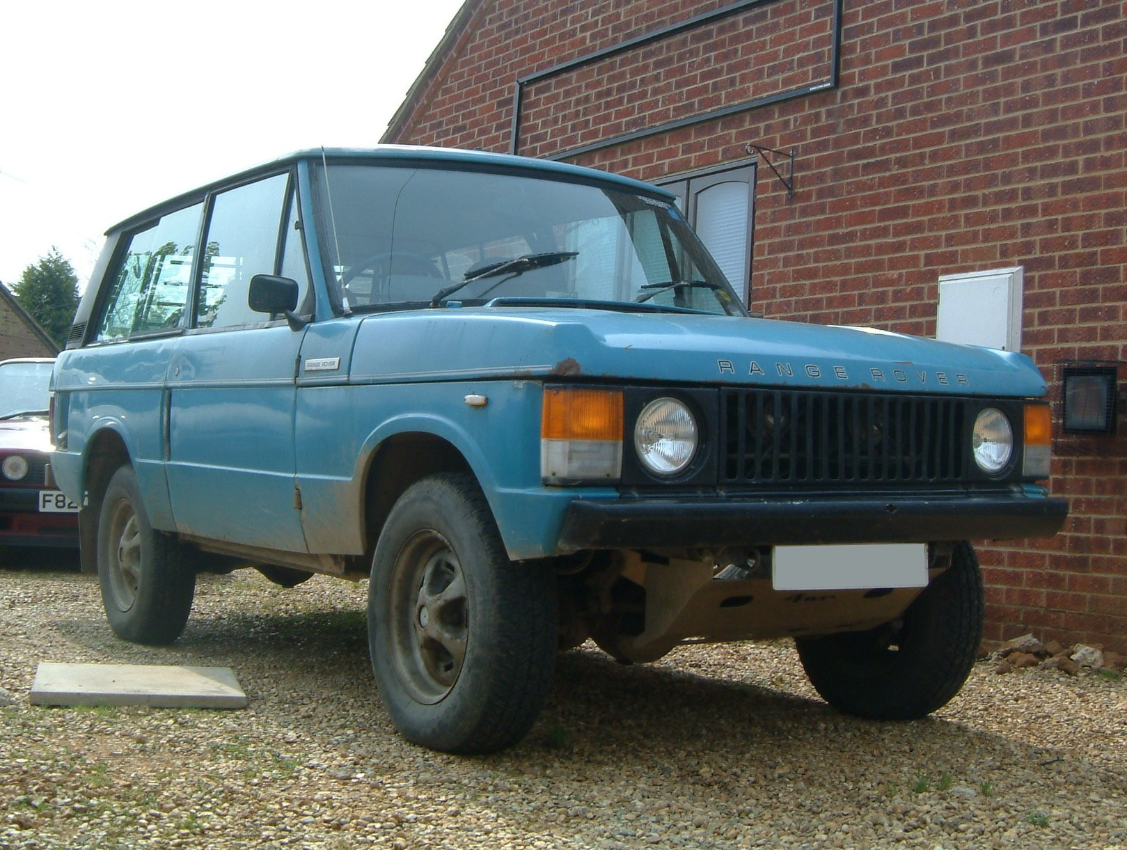 A battered 1979 Range Rover.